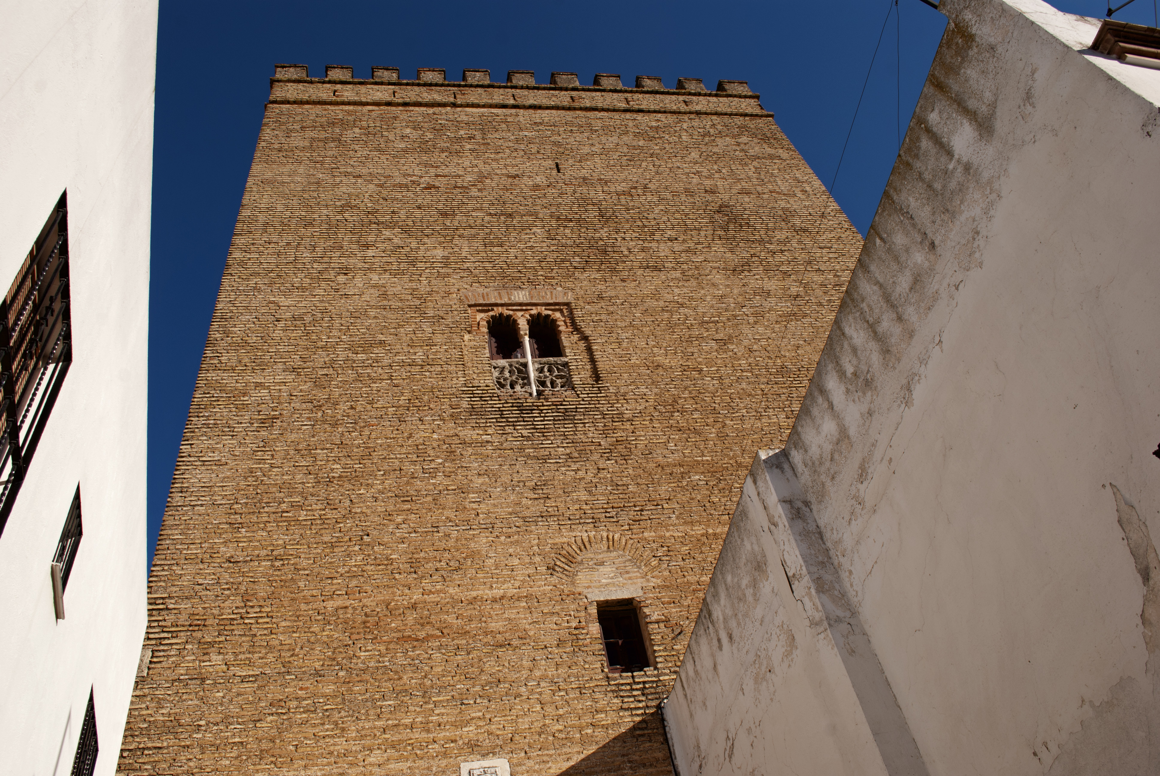 Torre de los guzmanes. La Algaba. (Sevilla, España)